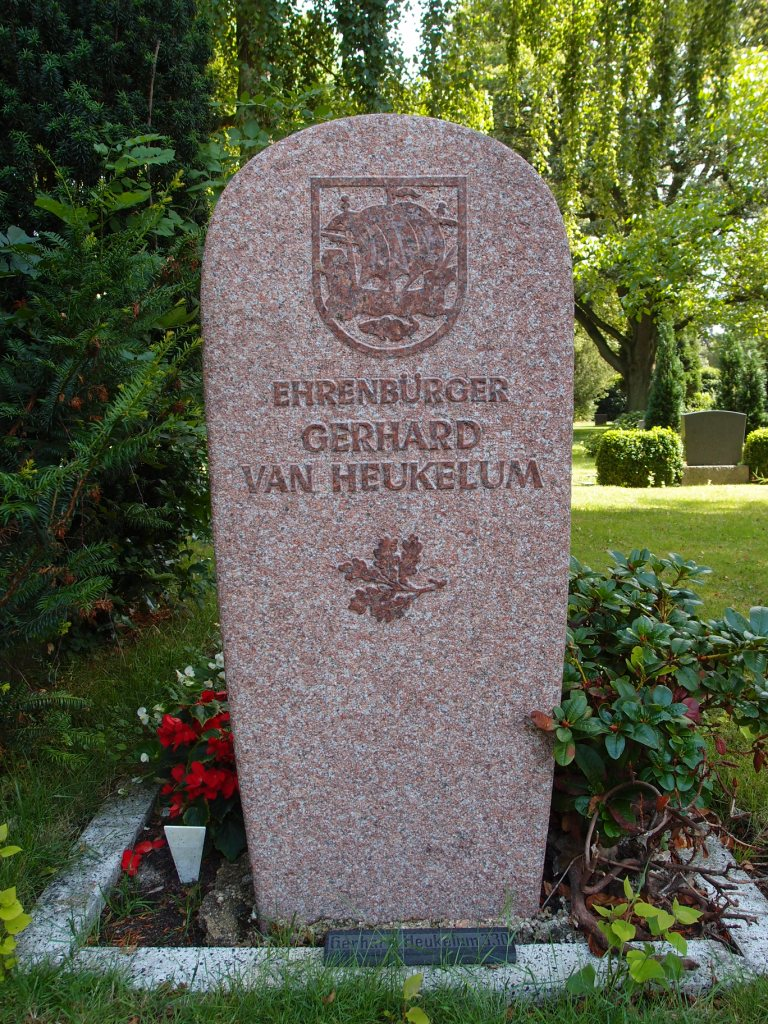 Grab von Gerhard van Heukelum auf dem Wulsdorfer Friedhof in Bremerhaven